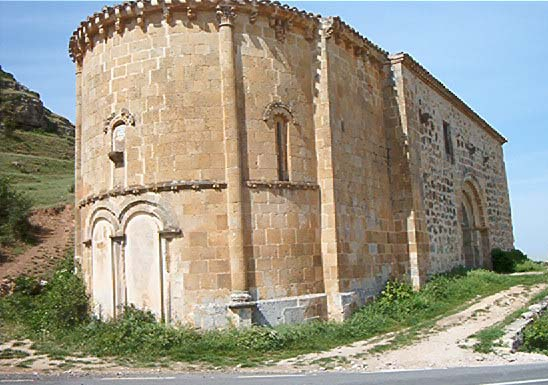 Ermita románica de La Soledad, Calatañazor, Soria, Castilla y León, España. La imagen es mía y la protejo bajo GFDL